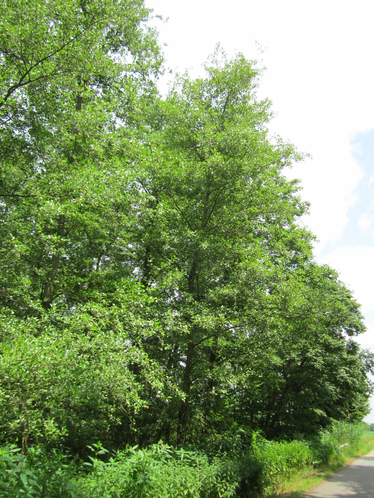 Grau-Erle (Alnus incana) im Naturschutzgebiet Marlach